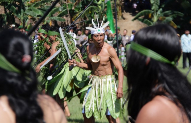 Tari Perang Enggano Tari Perang Masyarakat Suku Enggano mengisahkan pertempuran antar suku di Enggano yaitu suku Kauno, Kaitora, Kaarubi, Kaharuba, Kaohoa dan suku pendatang Ka'may dalam memperebutkan wilayah kekuasaan, yang berakhir pada perdamaian. Sebuah pertunjukan kebudayaan tradisional seusai upacara HUT RI ke 71 di Desa Apoho, Pulau Enggano, Bengkulu Utara, Provinis Bengkulu, Rabu (17/8/2016). Tarian perang ini diperankan 100 pemuda-pemudi serta para tokoh adat warga suku asli Enggano. [Rizky.T]